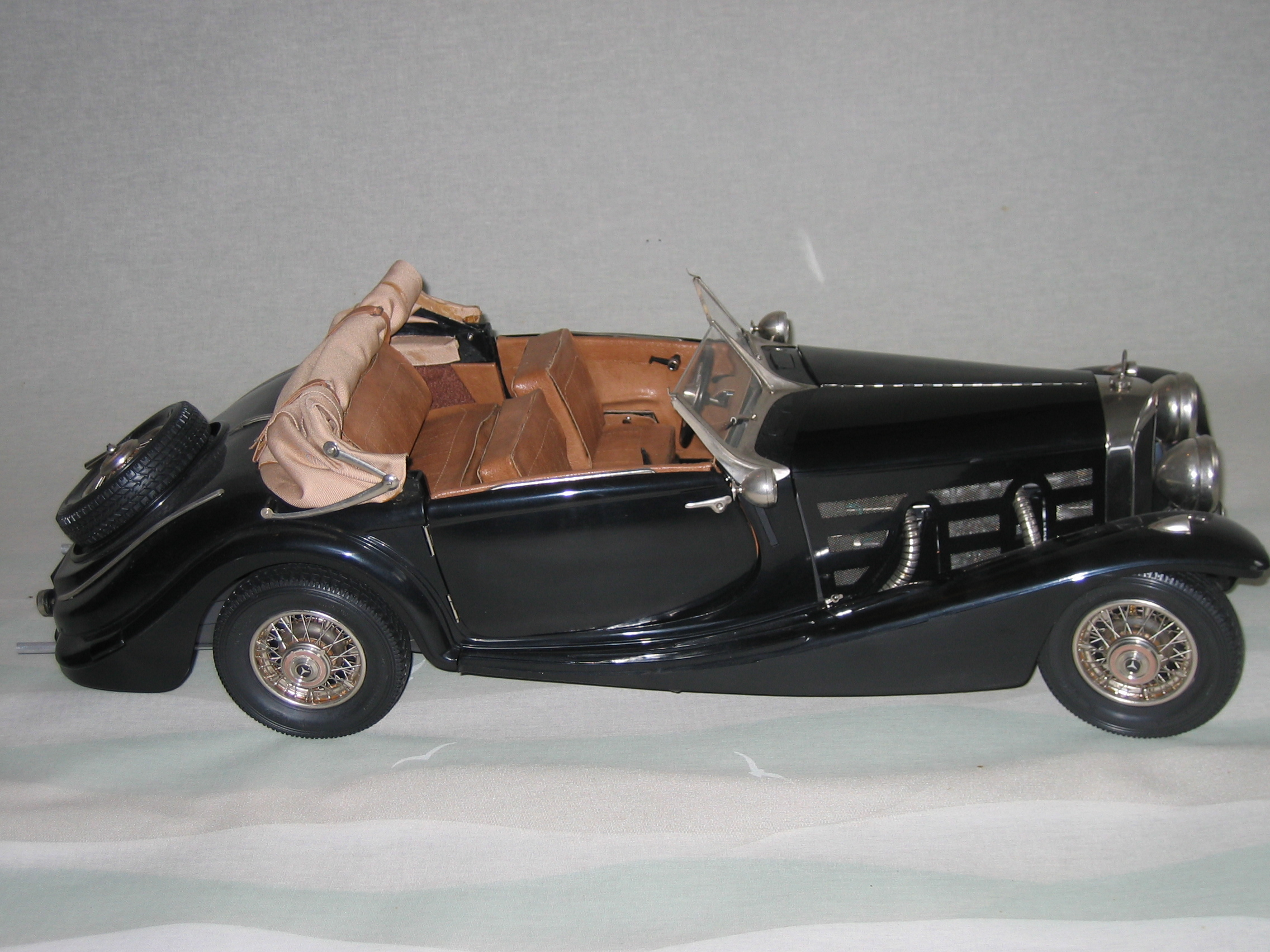 Eigen foto MHwater